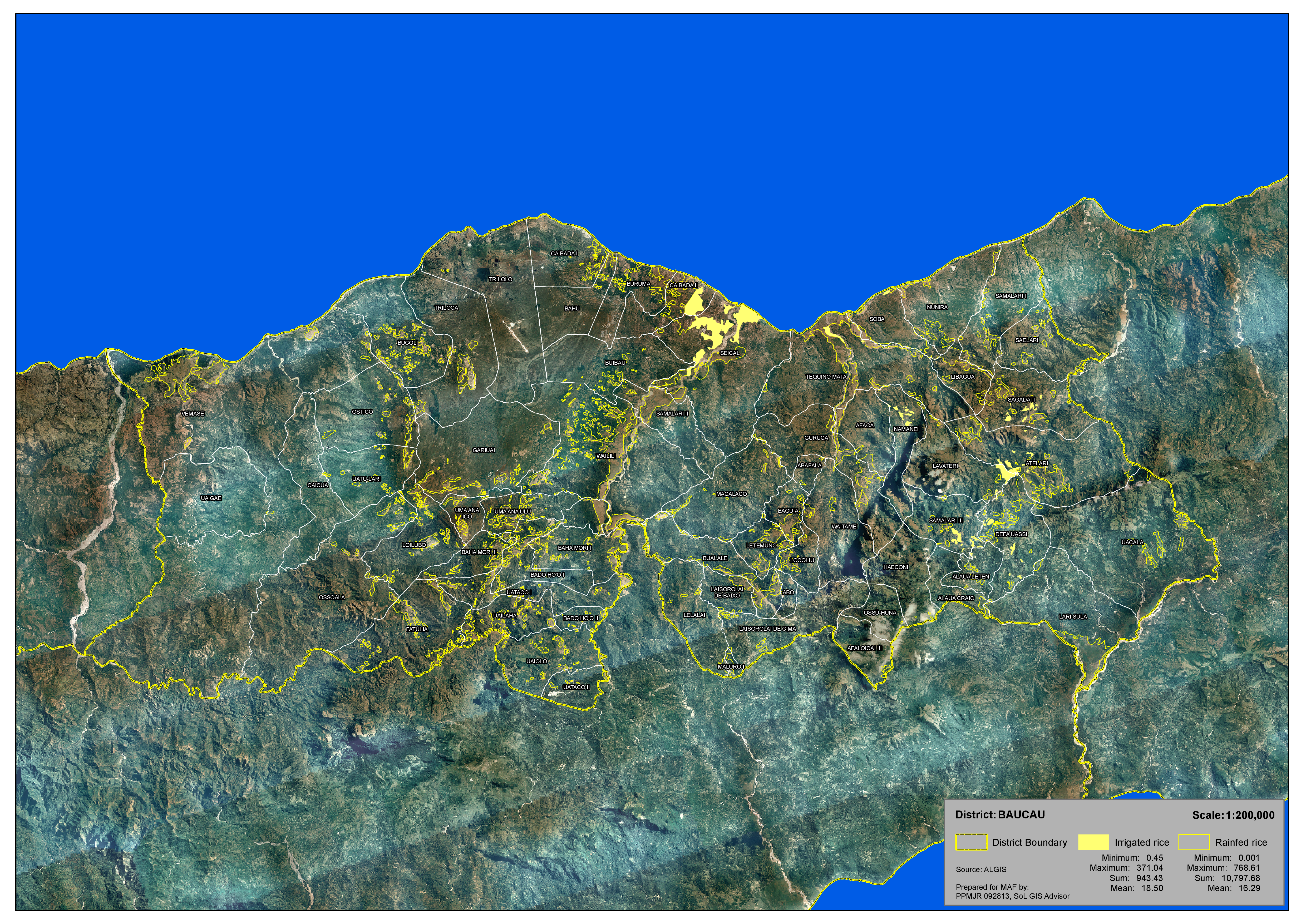 Reisfelder im Distrikt Baucau